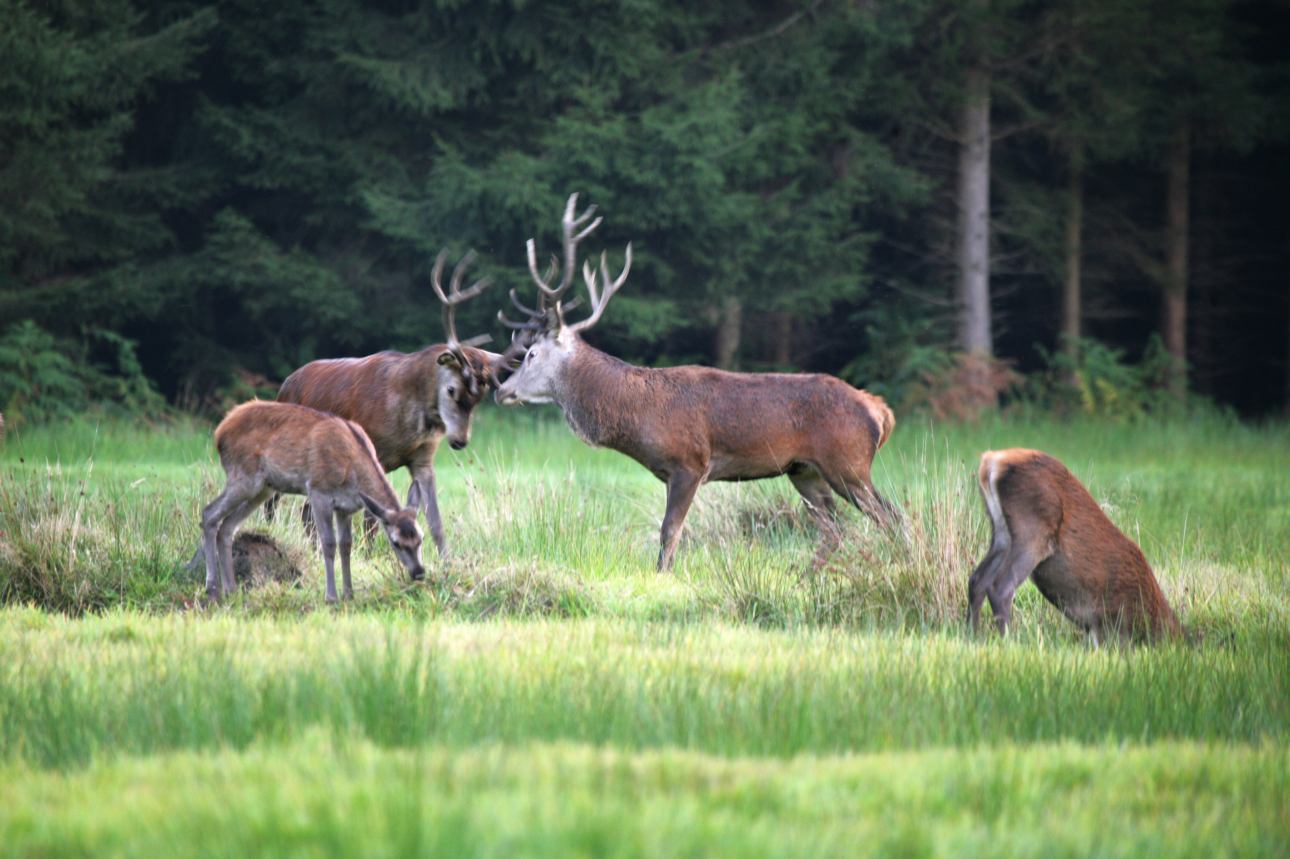 Rotwild zur Brunftzeit im sogenannten "Herrental". Ein südlich gelegenes Waldgebiet im Renaissance-Tiergarten von Schloss Raesfeld. Das Herrental zeichnet sich durch eine große Waldlichtung aus, wo das garnicht scheue Rotwild in freier Natur beobachtet werden kann: immer wieder ein Erlebnis der ganz besonderen Art, im Naturpark der Hohen Mark-Westmünsterland.